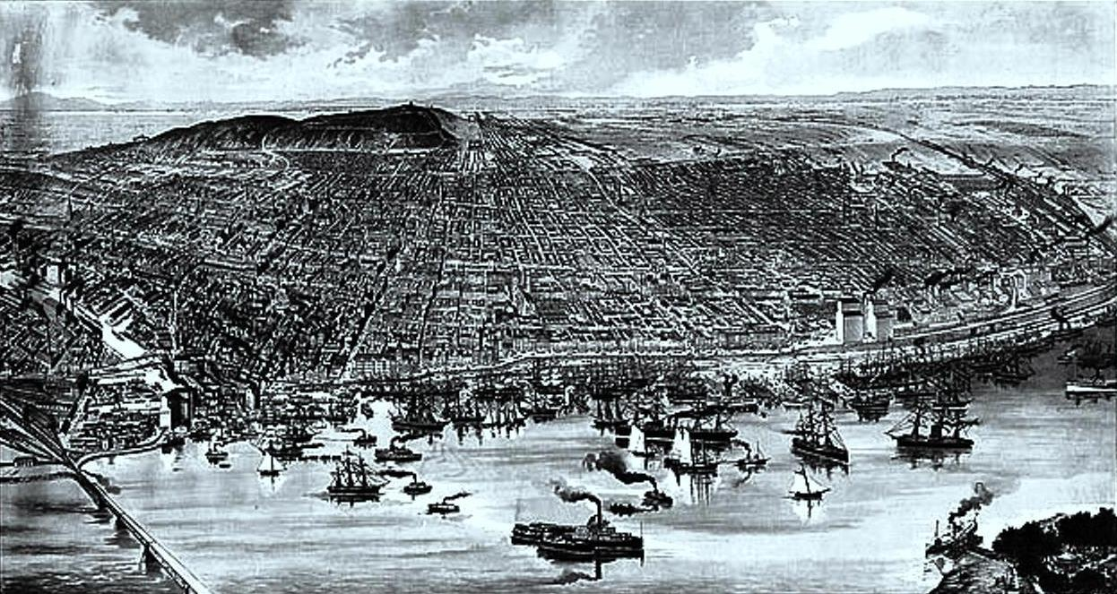 Montreal Canada 1889